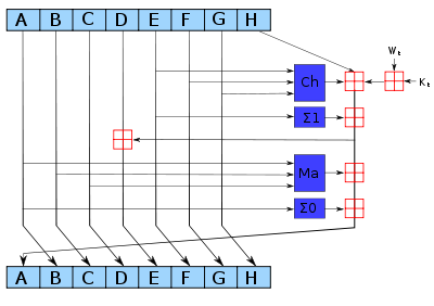 Монгол: 400px-SHA-2